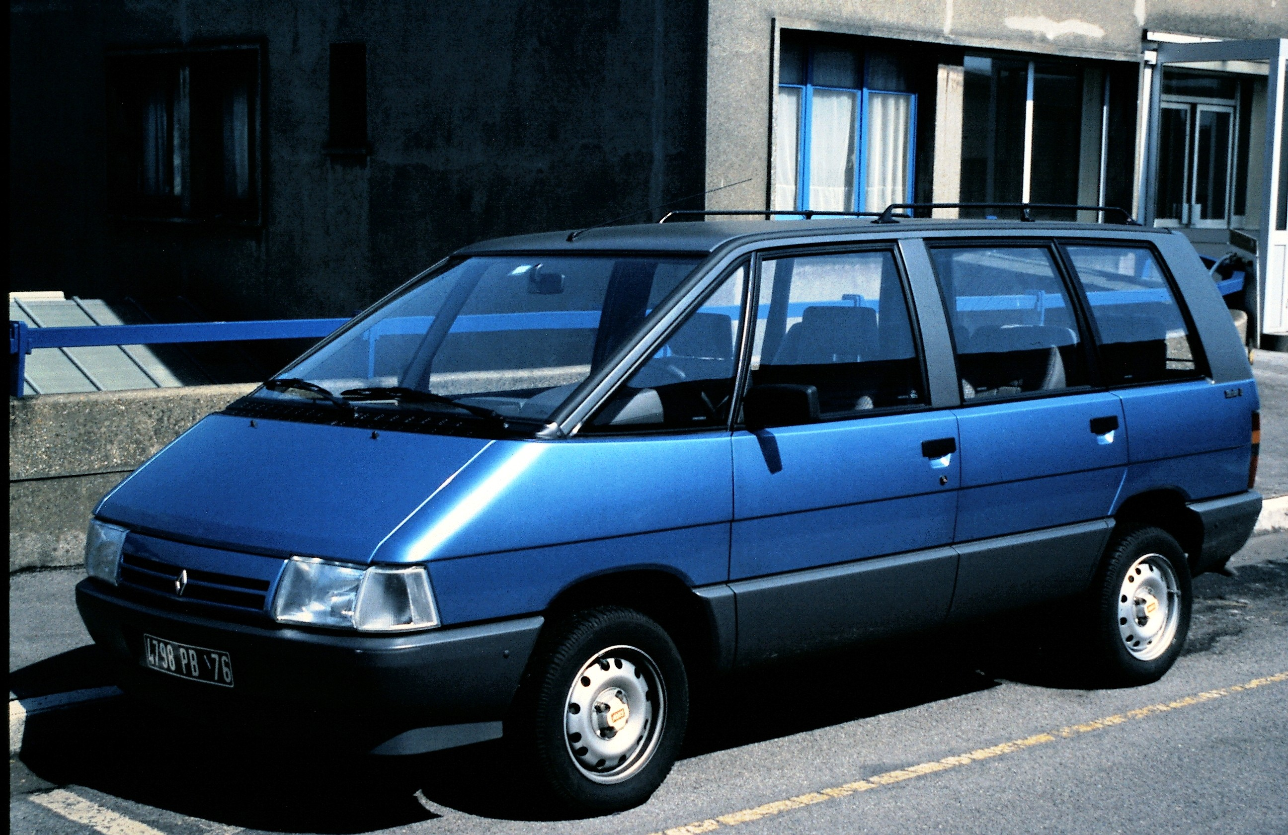 Renault Espace J11